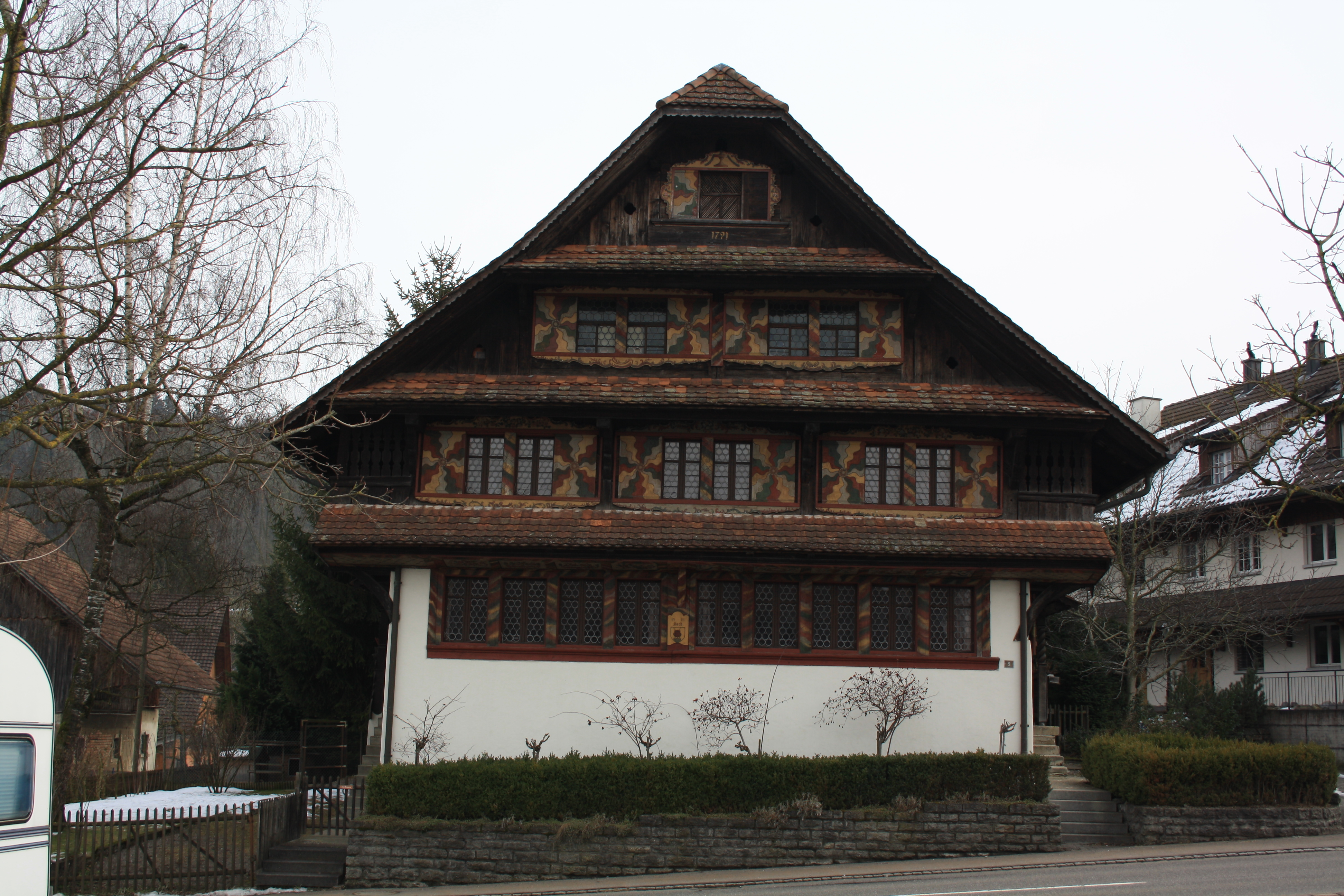 Koch-Haus in Büttikon, Aargau, Schweiz